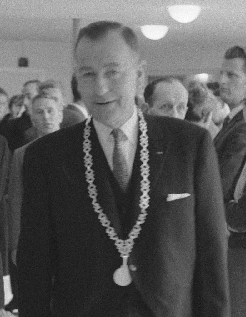 Koningin Juliana met de burgemeester van Maasland, F.J. Groot Enzerik